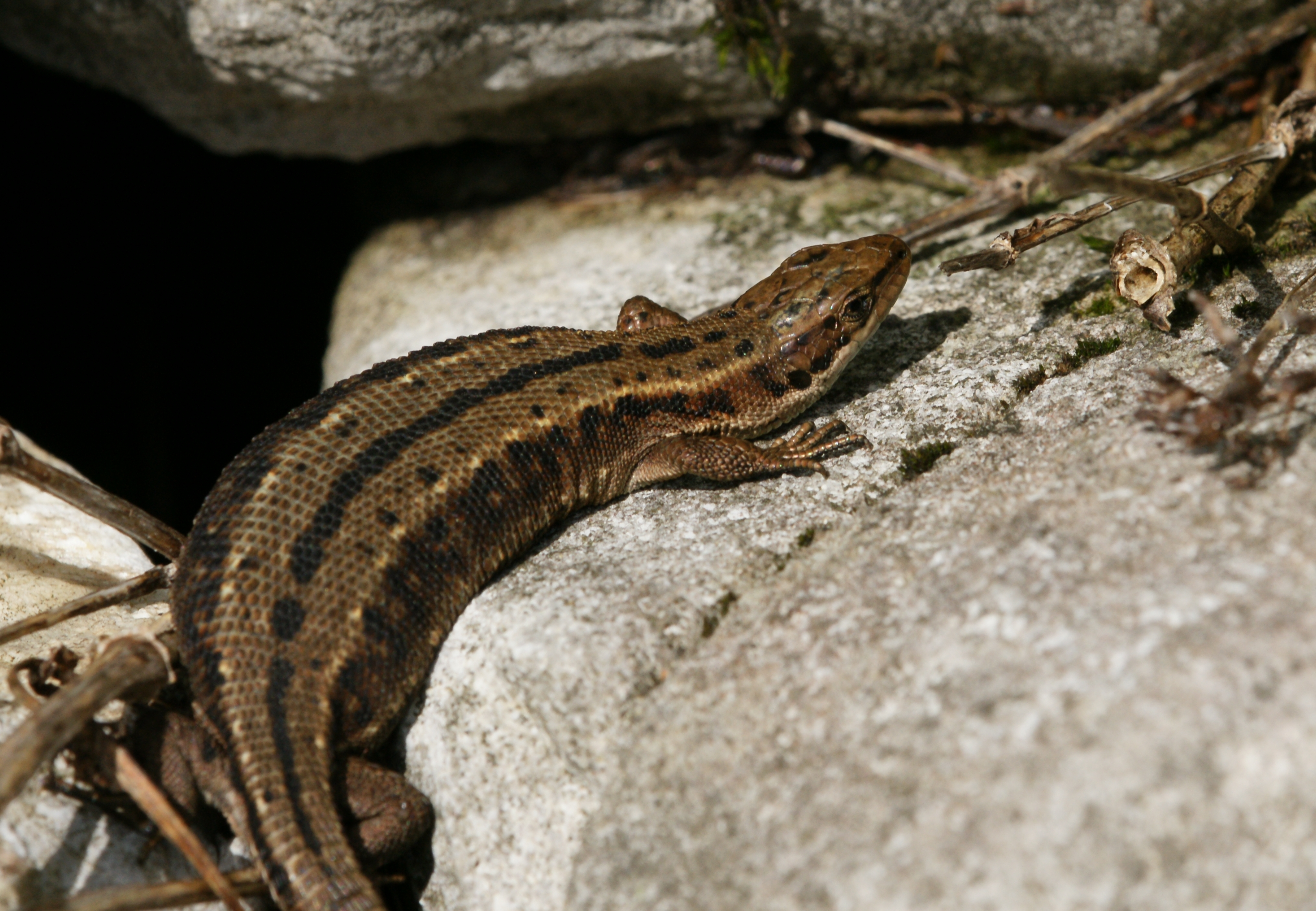 Zootoca vivipara